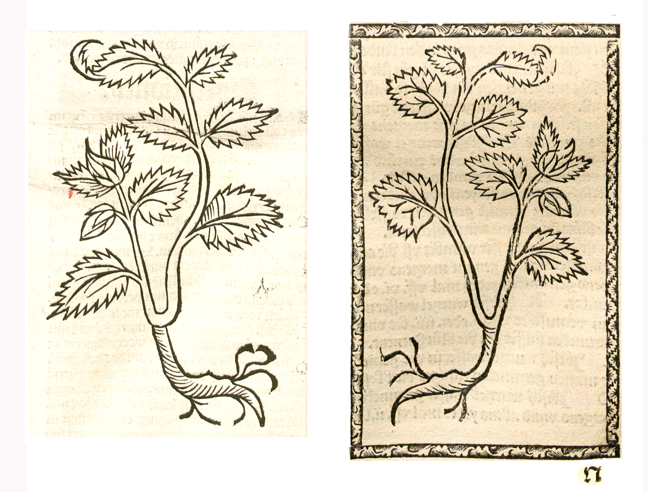 Abbildung von Ibisch Wurtzel Althaea officinalis)